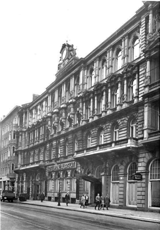 Berlin, Prinz-Albrecht-Straße, Reichsführung SS Zentralbild Berlin 1934 Das Hotel "Prinz Albrecht" in der Prinz-Albrecht-Straße wird von der Reichsführung der SS bezogen. 35 349-34